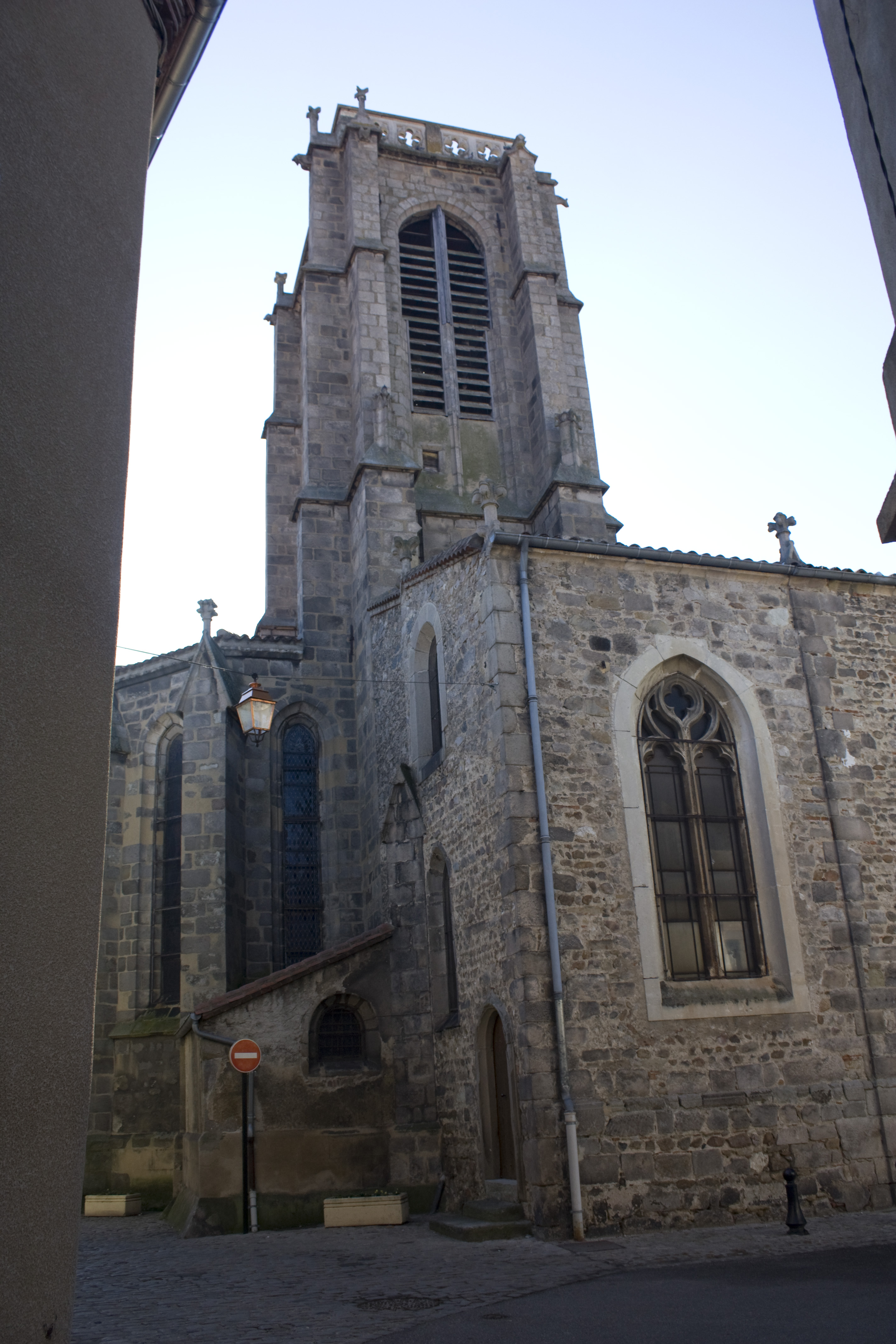 Clocher de l' église saint André.